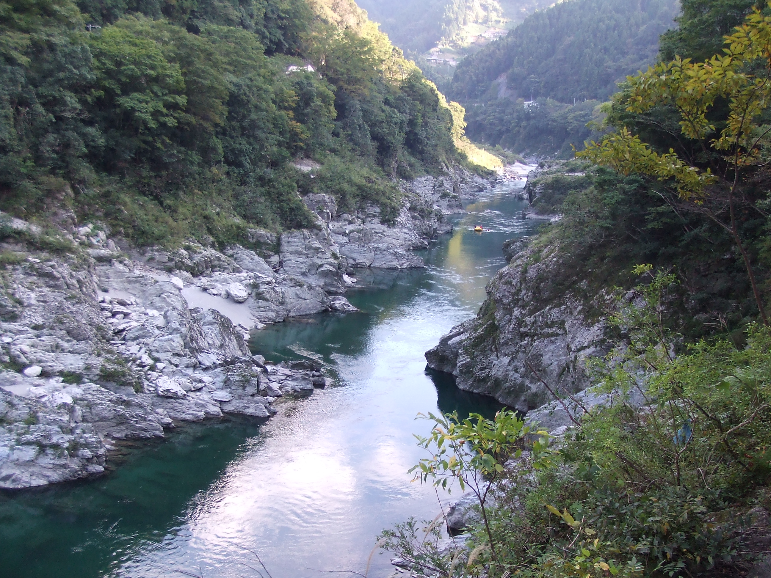 大歩危渓谷の様子